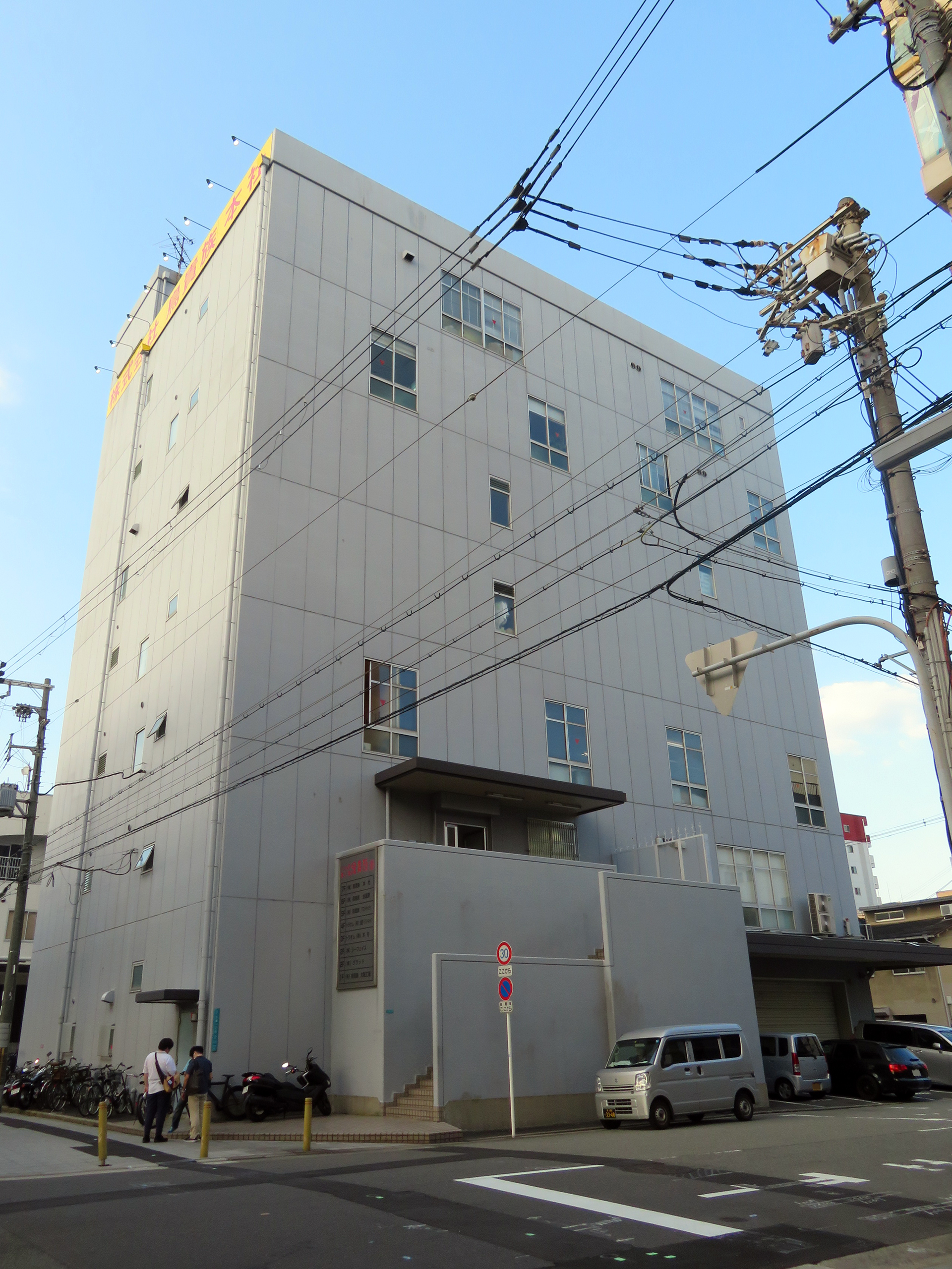 ナミコービルを撮影。 Canon PowerShot SX720 HS